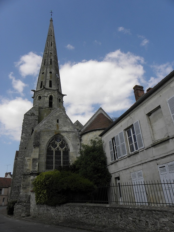 Chevet de l'église Saint-Pierre et Saint-Paul d'Acy-en-Multien (60)